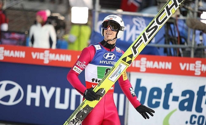 Konkurs drużynowy mężczyzn na skoczni K-120